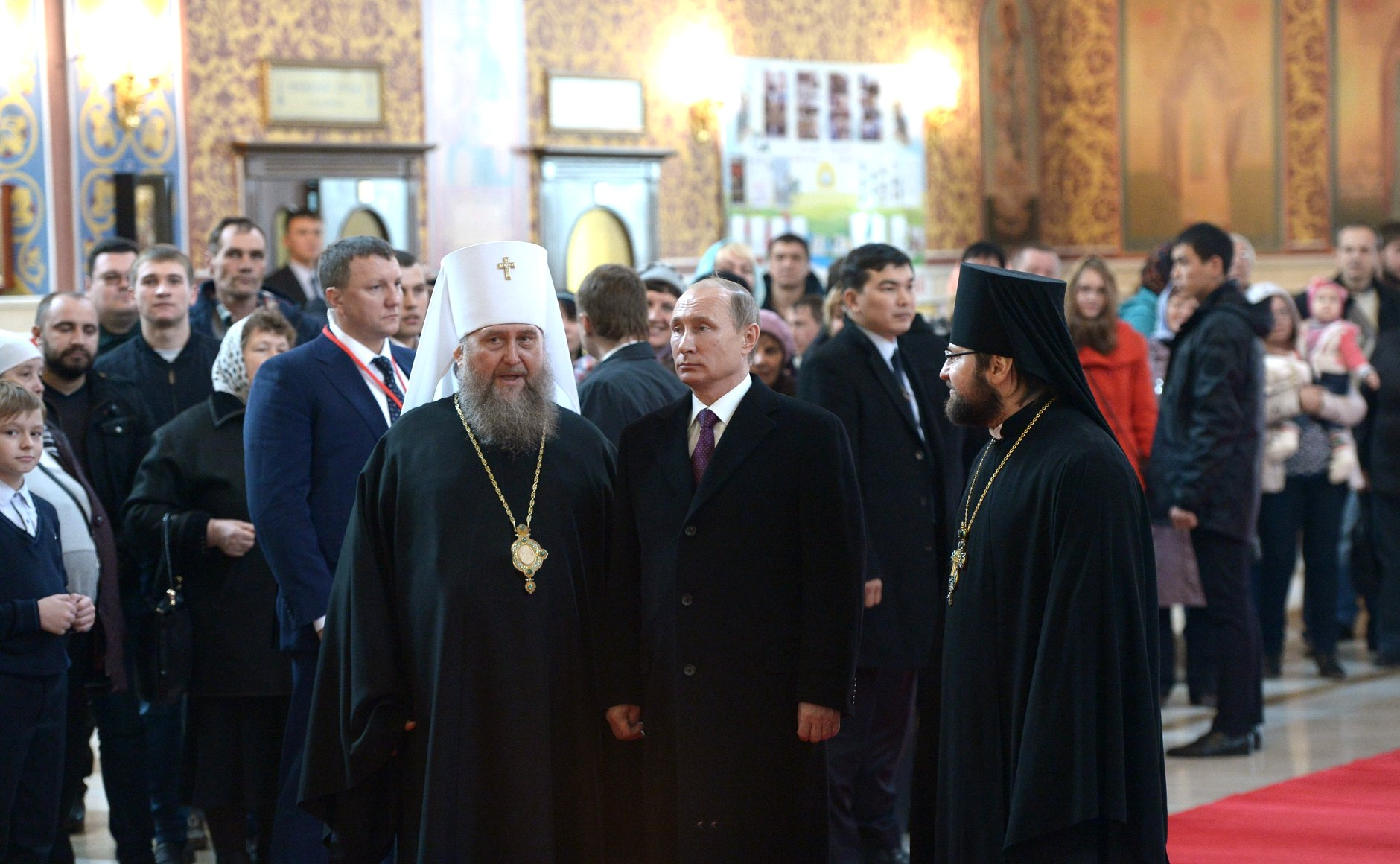 Посещение Президентом России Владимиром Путиным Свято-Успенского кафедрального собора в Нур-Султан. Его сопровождают митрополит Астанайский и Казахстанский Александр и архимандрит Сергий (Карамышев)